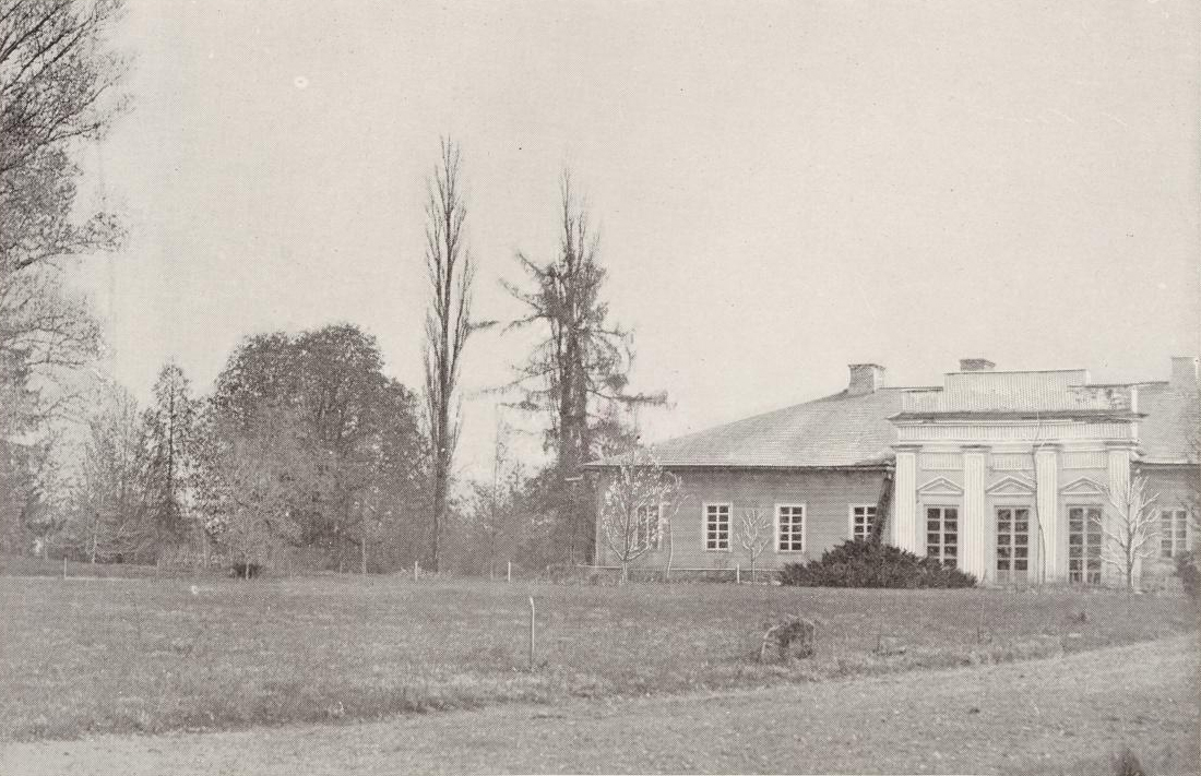 Беларуская (тарашкевіца): Задзьвея (Zadźvieja), сядзіба Чачотаў (Čačot)